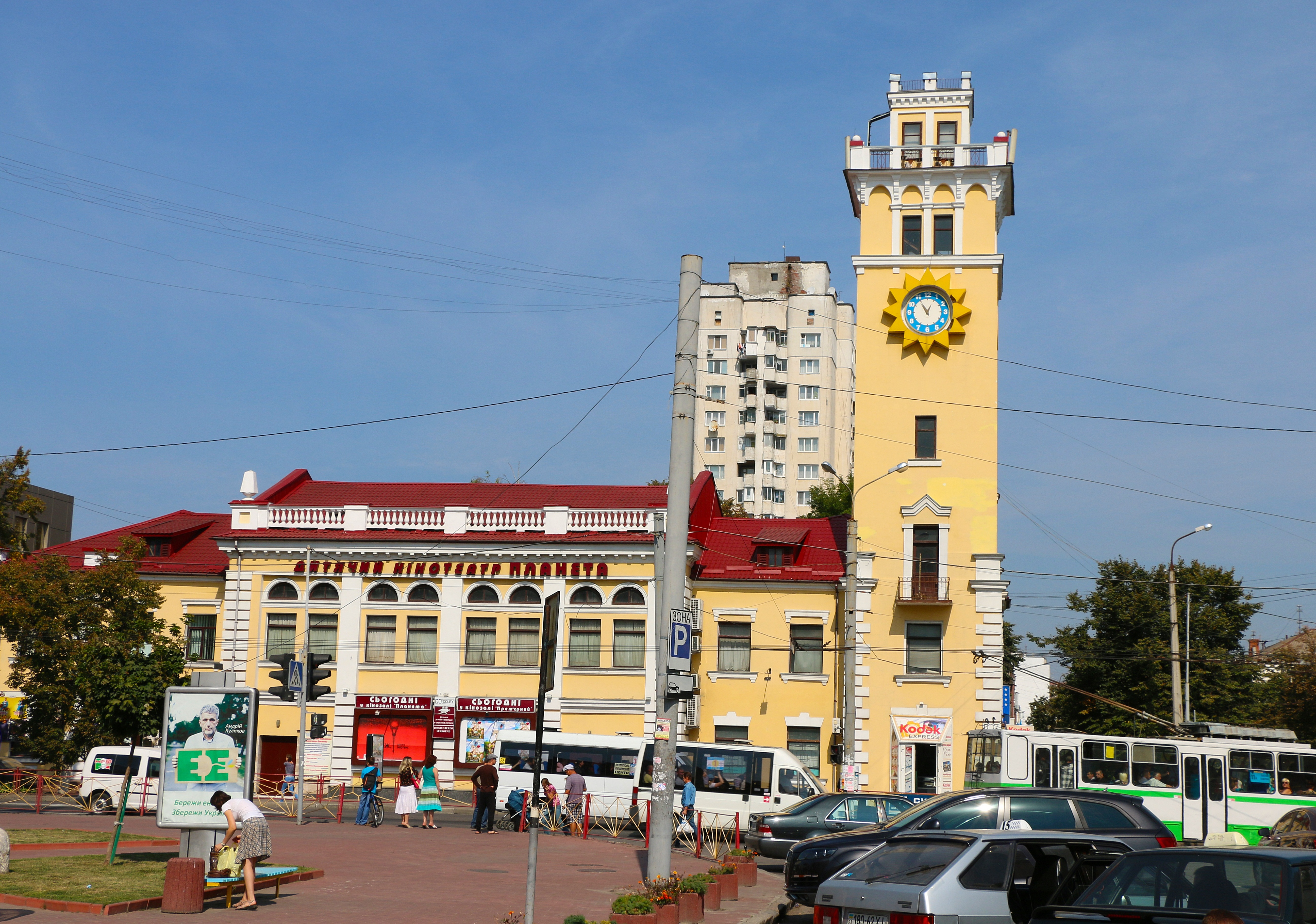 Пожежне депо (мур.), Хмельницький, вул. Подільська, 39